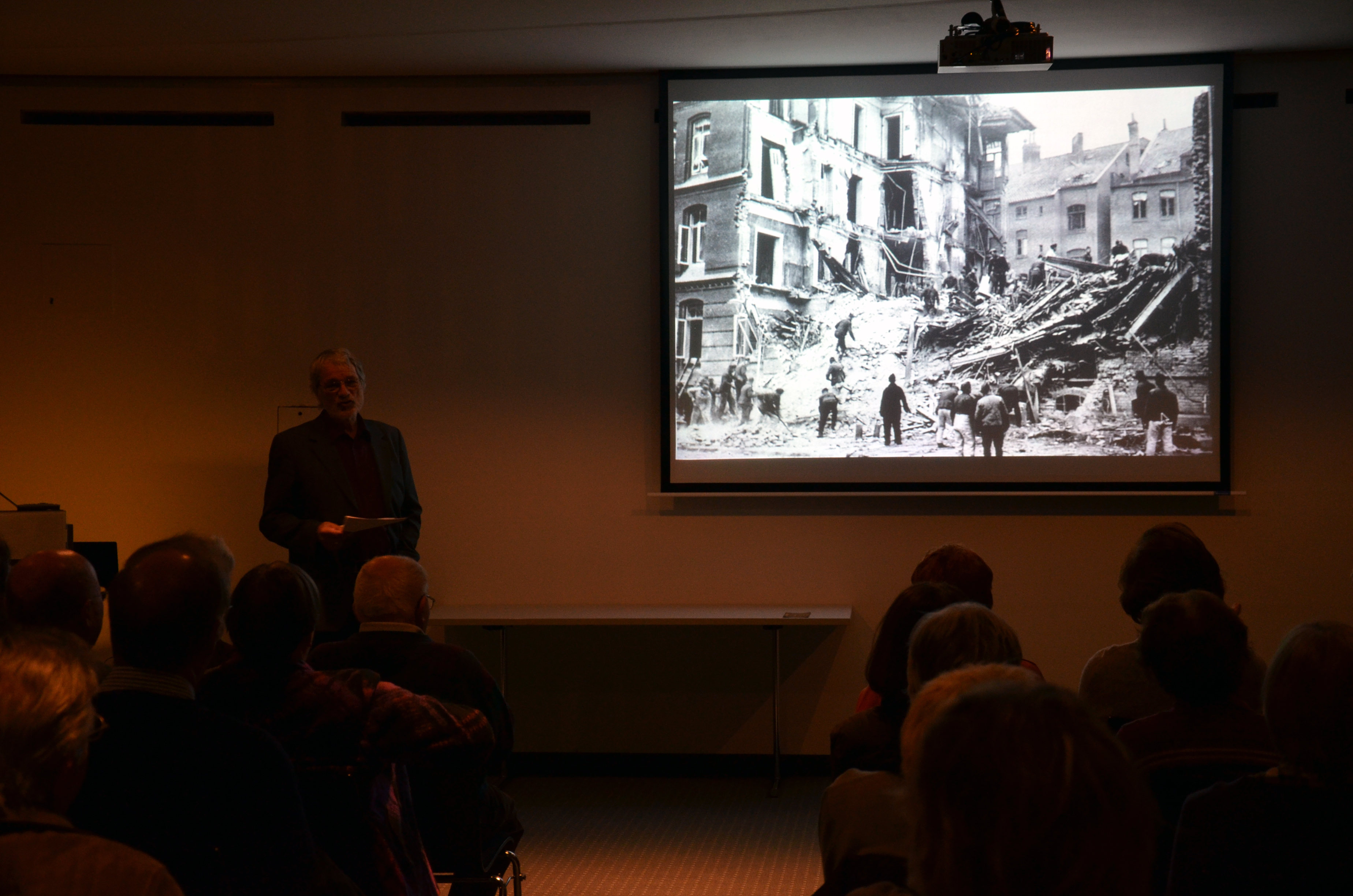 Der Bauhistoriker Sid Auffarth referiert im Historischen Museum am Hohen Ufer über die Luftschutzbunker in Hannover anhand von eigenen Fotos, historischen Aufnahmen und Plänen aus dem Museum oder dem Stadtarchiv Hannover. Hier ist ein zu Beginn der Luftangriffe auf Hannover bereits zerstörtes Gebäude in der Friesenstraße zu sehen, an dessen Stelle dann der dort noch heute befindliche Bunker errichtet wurde ...